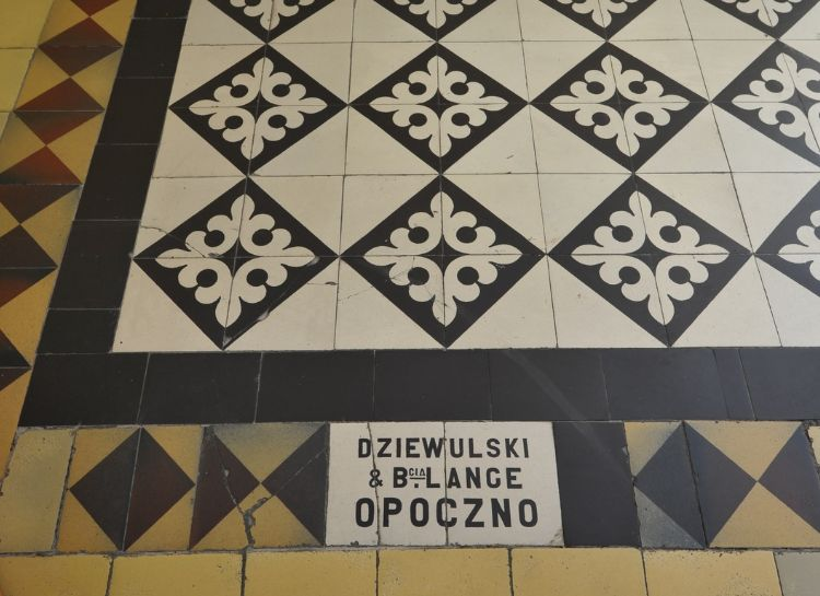 2017. Kafelki wewnątrz budynku Towarzystwa Przytułku św. Franciszka Salezego w Warszawie. Fot. Ewa Szczepańska